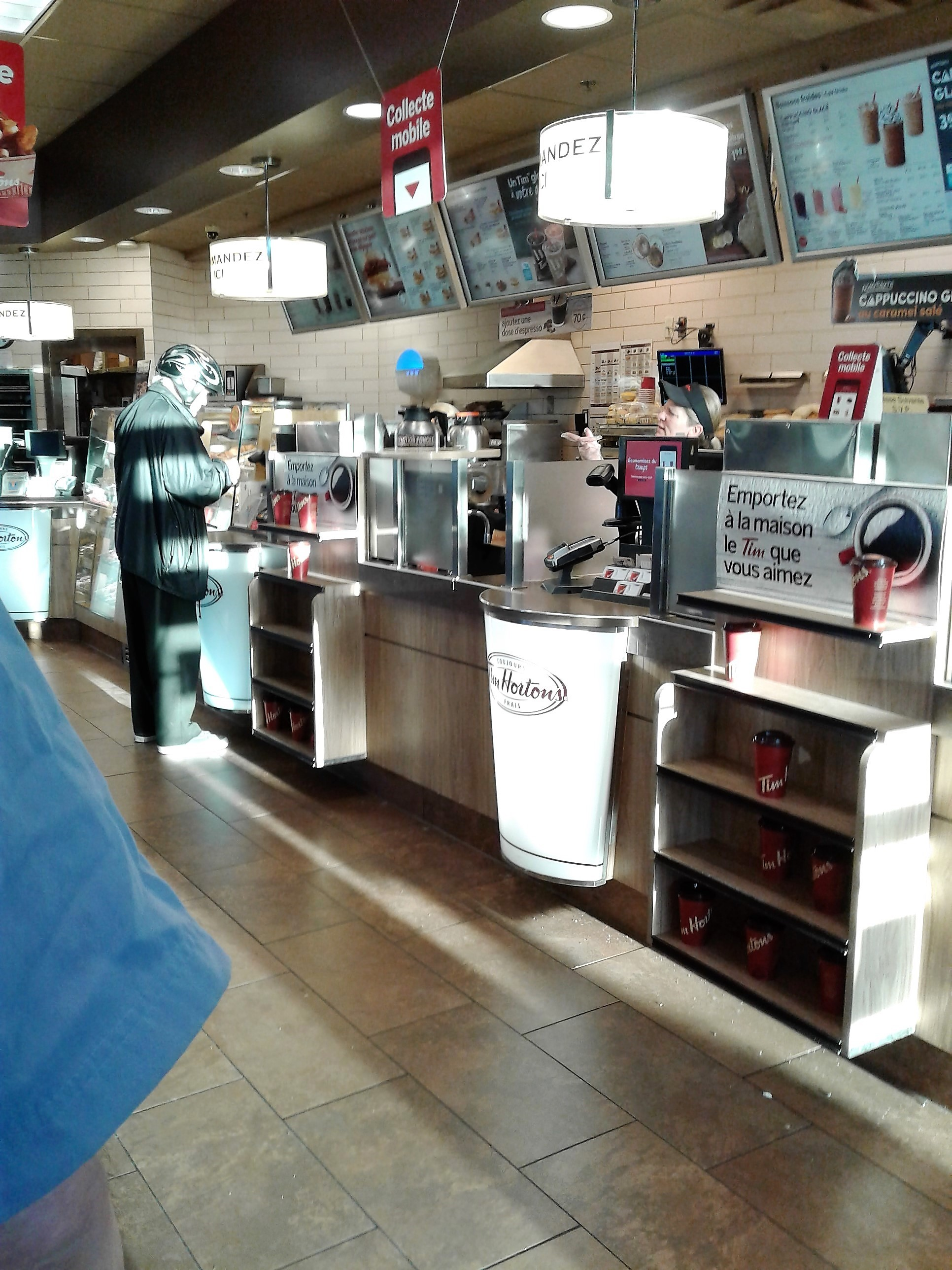 Restaurant Tim Hortons, 8481, boulevard Newman, LaSalle, Montréal